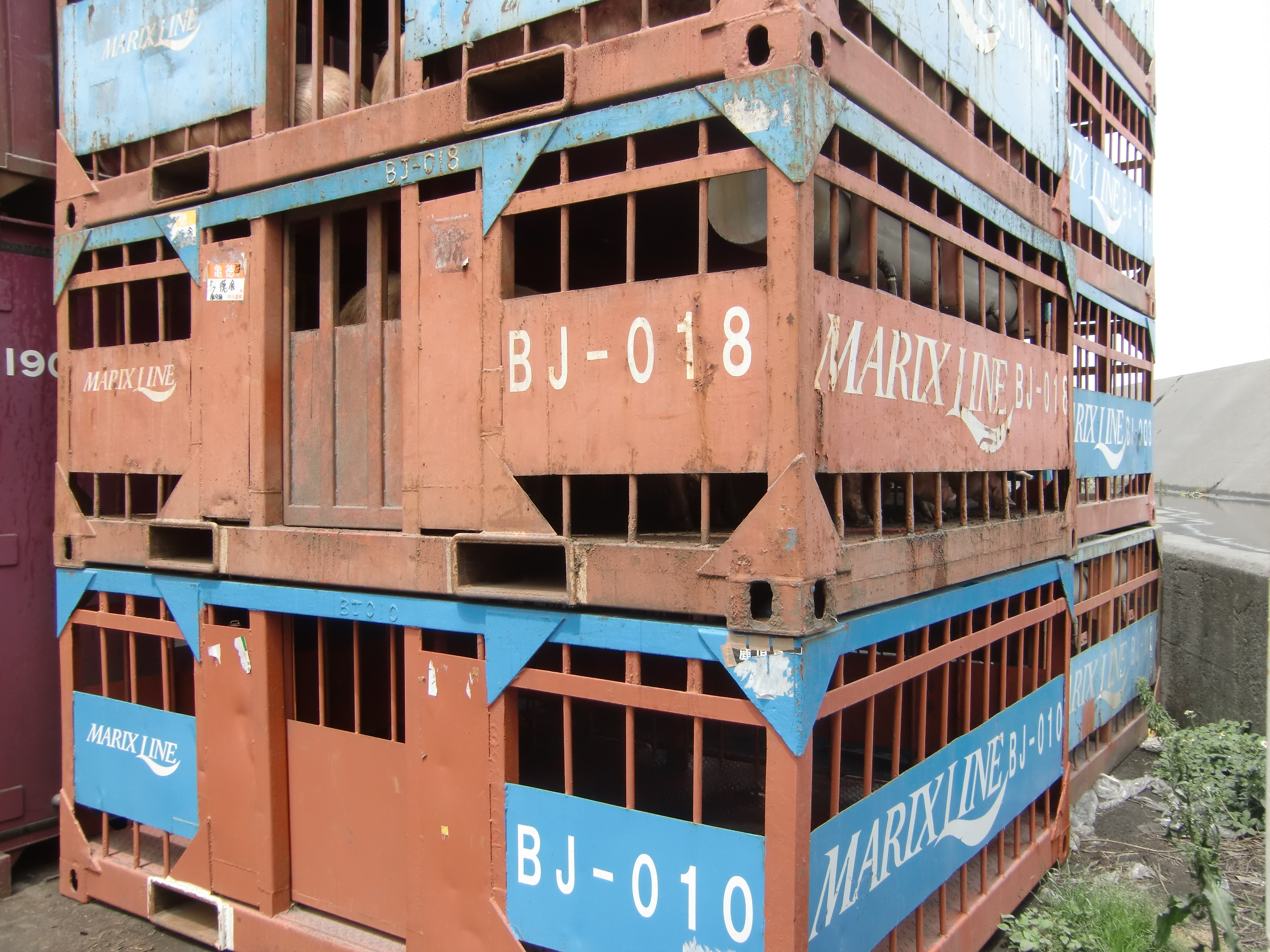 本土 ⇔ 沖縄・南九州離島地域で活躍する『 マリックスライン 』所有の内航専用、10ftハーフ型家畜輸送用、ペンコンテナ。 ※正面右側上部に太いビニールパイプを改造したタンク型の、家畜用水飲み設備が備わっている。 【 鹿児島県／鹿児島新港 】